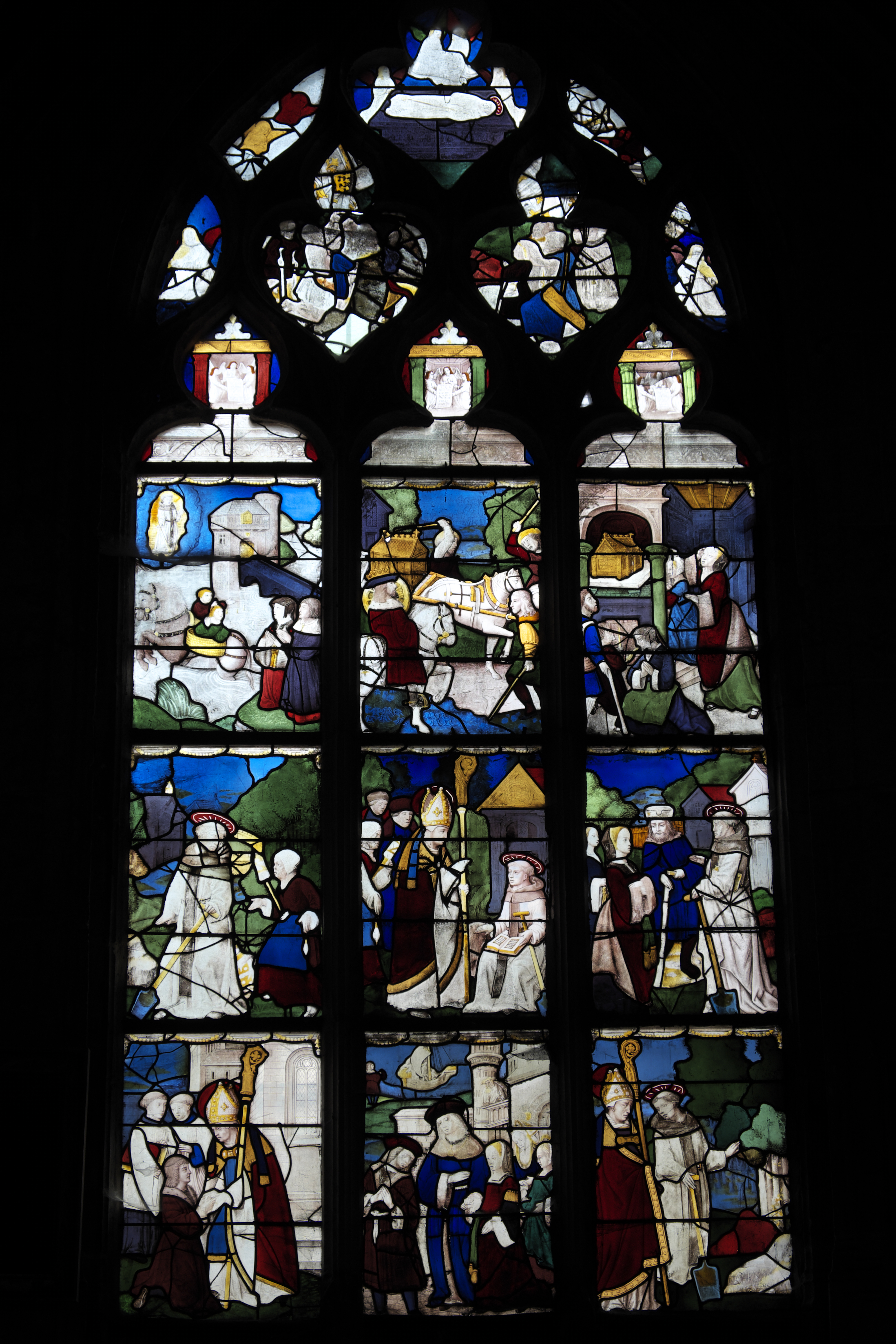 Katholische Kirche Saint-Pierre in Dreux im Département Eure-et-Loir (Centre-Val de Loire/Frankreich), Bleiglasfenster (baie 25) aus dem frühen 16. Jahrhundert; Darstellung: Legende des hl. Fiacrius